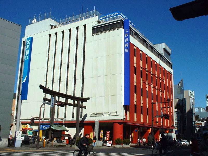 上野百貨店本館